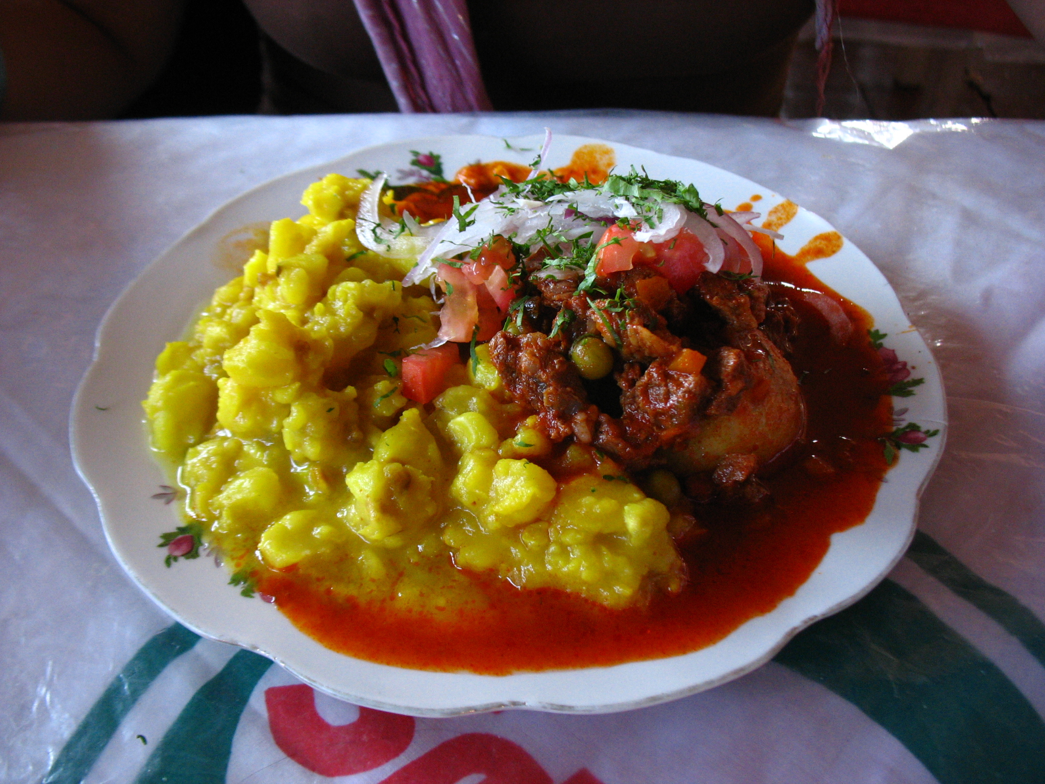 1Maiz con chuño y aji de carne. Foto tomada en Potosí, Bolivia.